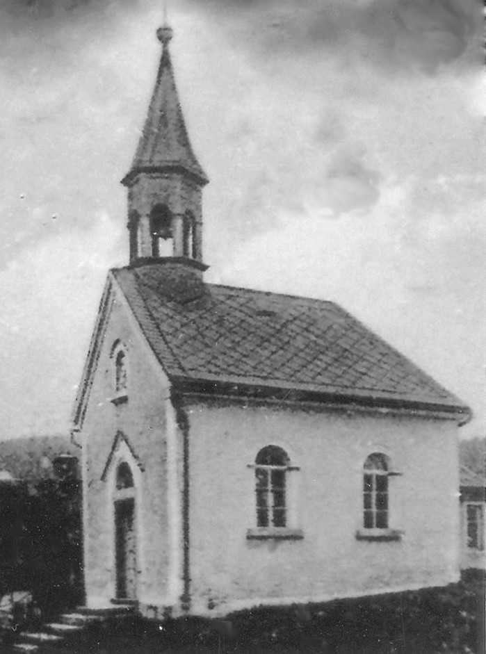 Kaple Anděla Strážce v Severním (Lobendava)